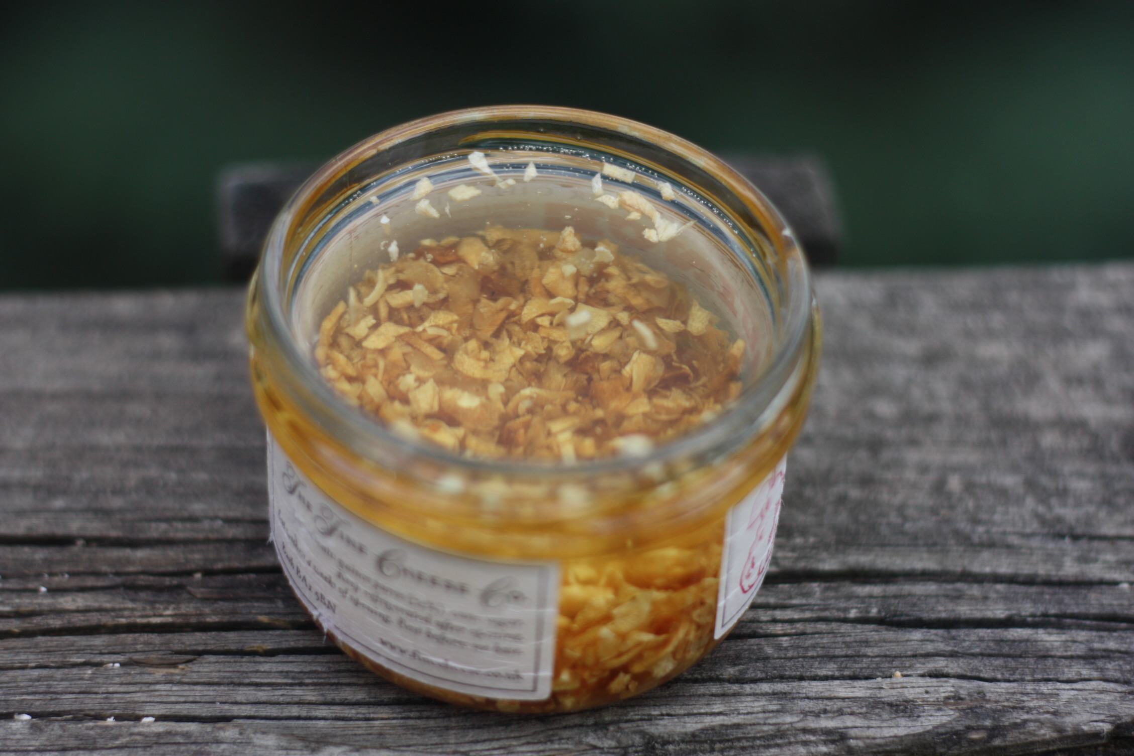 Garlic oil